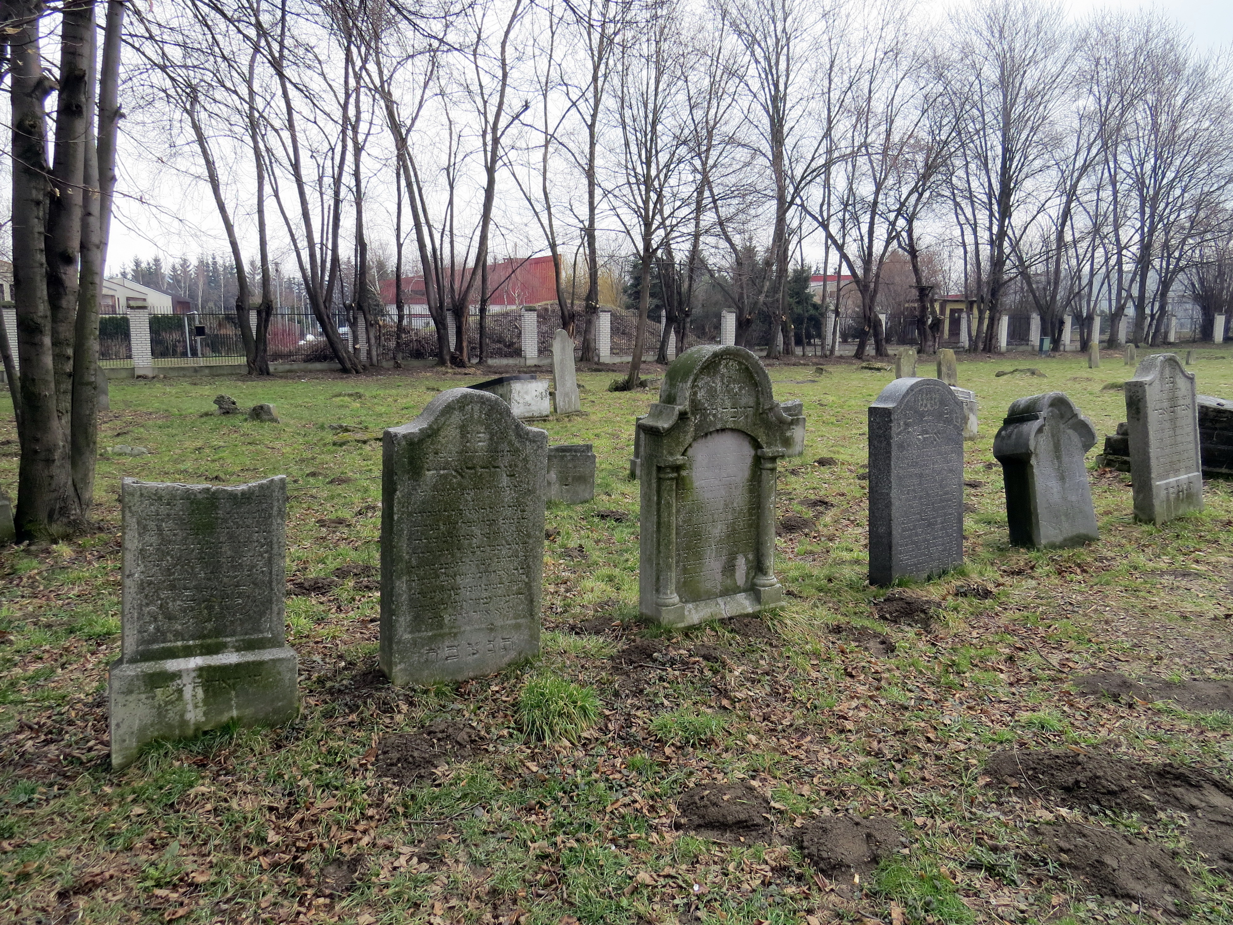 Cmentarz żydowski w Nowym Sączu.